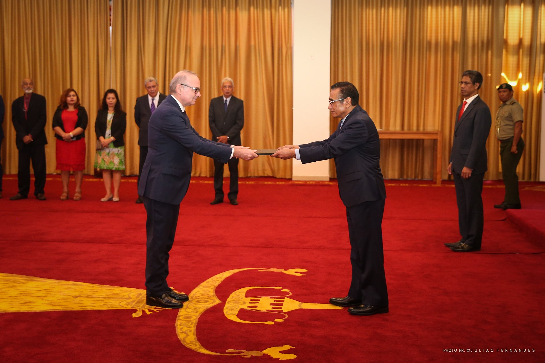 Olivier Chambard, französischer Botschafter in Osttimor, am Tag der Übergabe seiner Akkreditierung, mit Staatspräsident Francisco Guterres